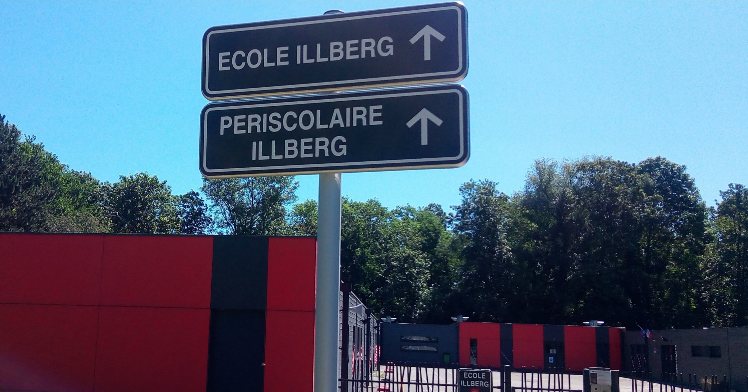 École Illberg et périscolaire